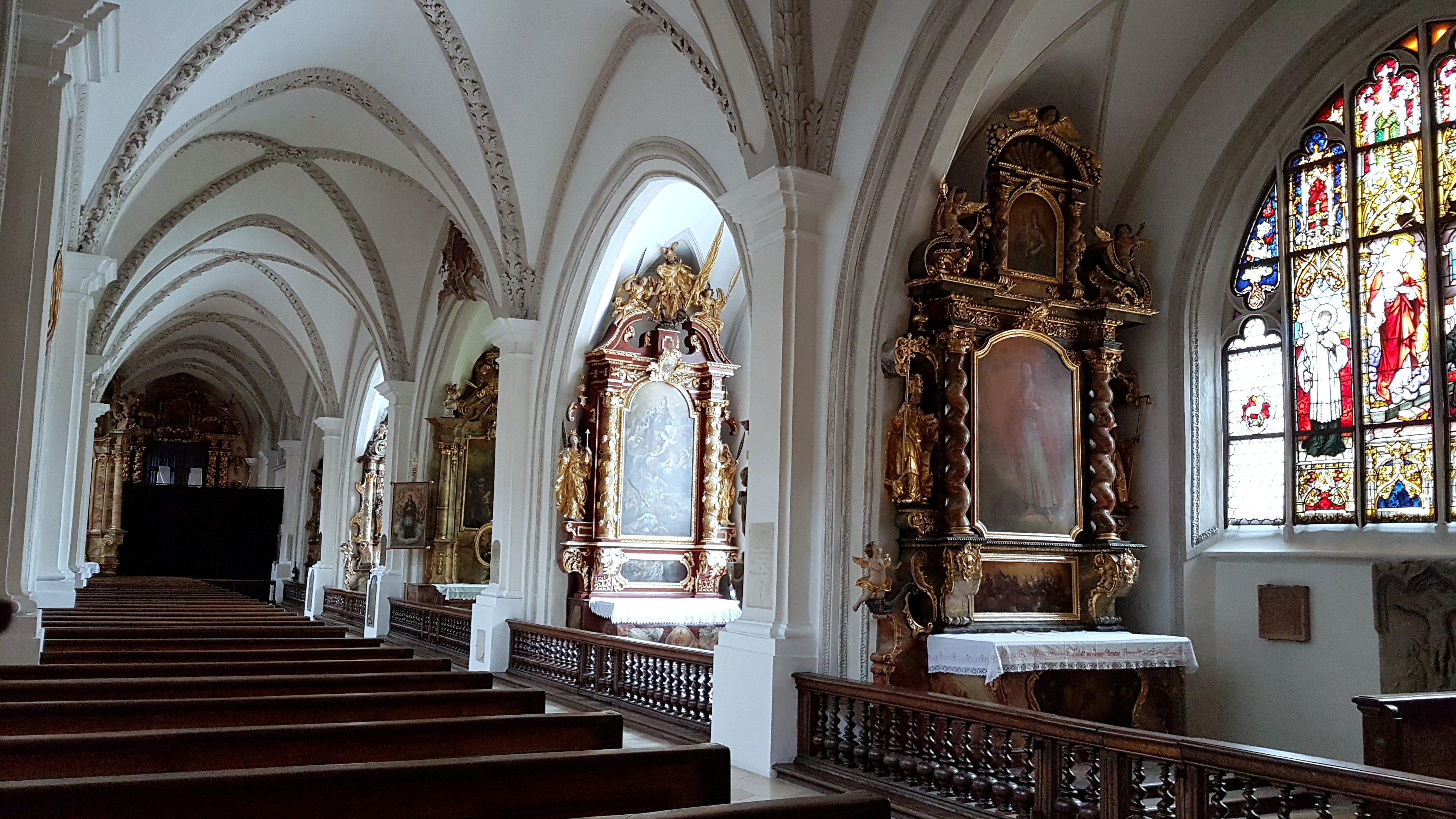 Mariä Himmelfahrt (Landsberg am Lech), Blick durchs rechte Seitenschiff und zu den Kapellenaltäre.